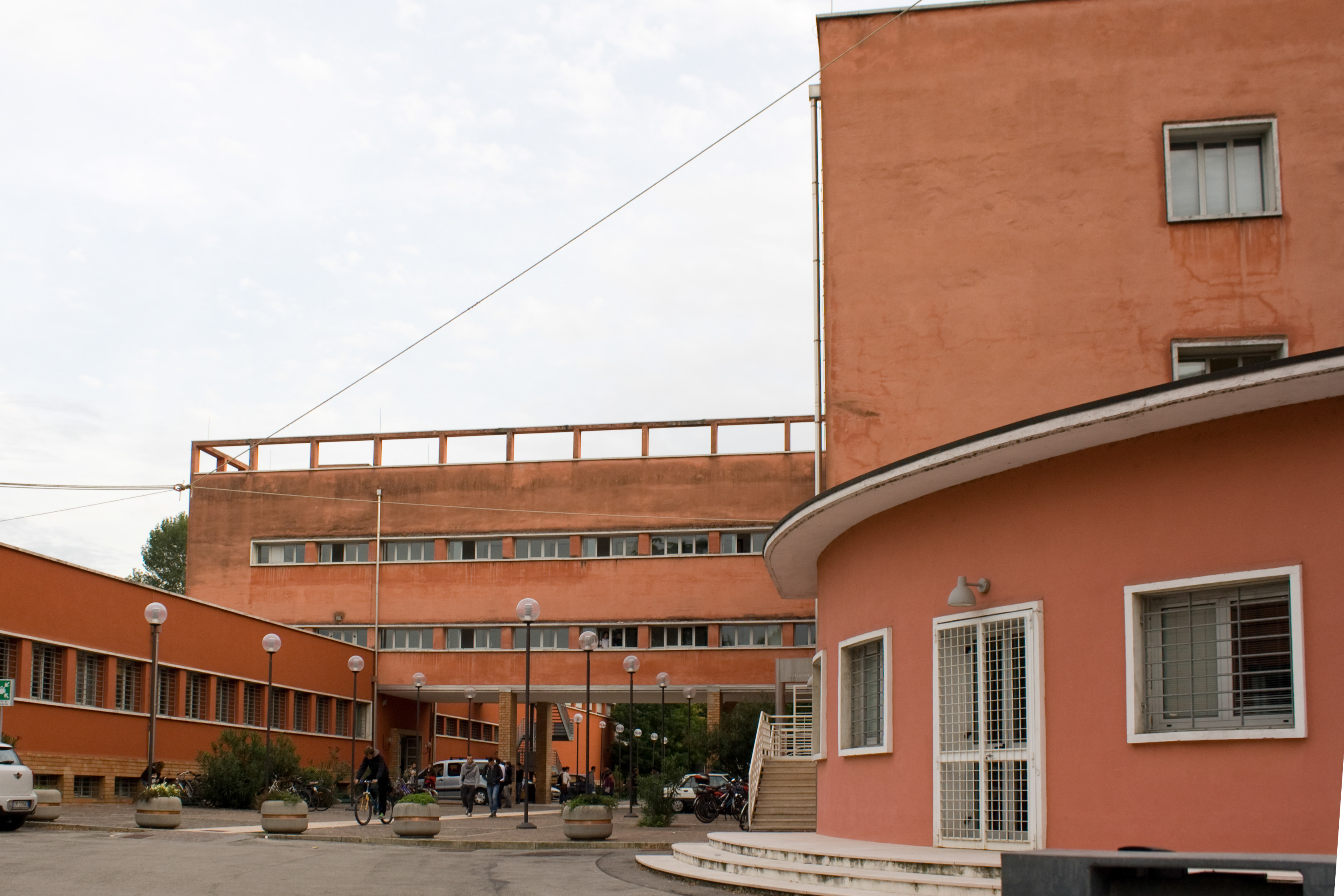 Palazzo Opera Balilla, ex-GIL